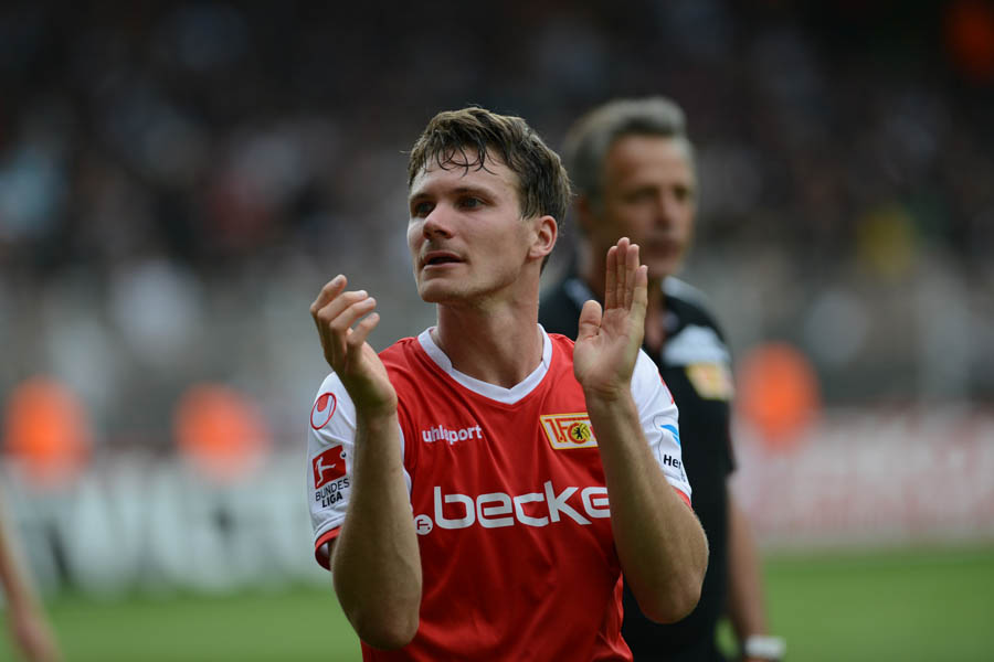 Michael Parensen hebt die Dauem vor den Fans